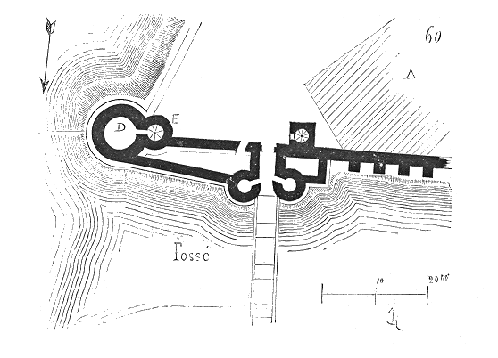 ... La tour de Nesle, bâtie sous le règne de Philippe-Auguste, en même temps que l'enceinte de Paris, c'est-à-dire vers 1200, est désignée dans un acte de 1210: Tornella Philippi Hamelini supra Sequanam. Ce n'est qu'un siècle plus tard qu'elle est connue sous le nom de tour de Nesle ou de Nelle. Elle était plantée à la place qu'occupe le pavillon oriental du palais de l'Institut. Sur le quai, près d'elle, s'ouvrait la porte de la ville dite porte de Nesle (voyez le plan, fig. 60), et en A s'étendait l'hôtel de même nom. La tour de Nesle D avait, hors œuvre, cinq toises de diamètre, possédait deux étages voûtés et deux étages plafonnés, avec une plate-forme à laquelle arrivait l'escalier à vis E, apres avoir desservi tous les étages. Cet escalier dépassait de beaucoup le niveau de la plate-forme (qui peut-être était primitivement couverte par un comble conique) et servait de guette ...